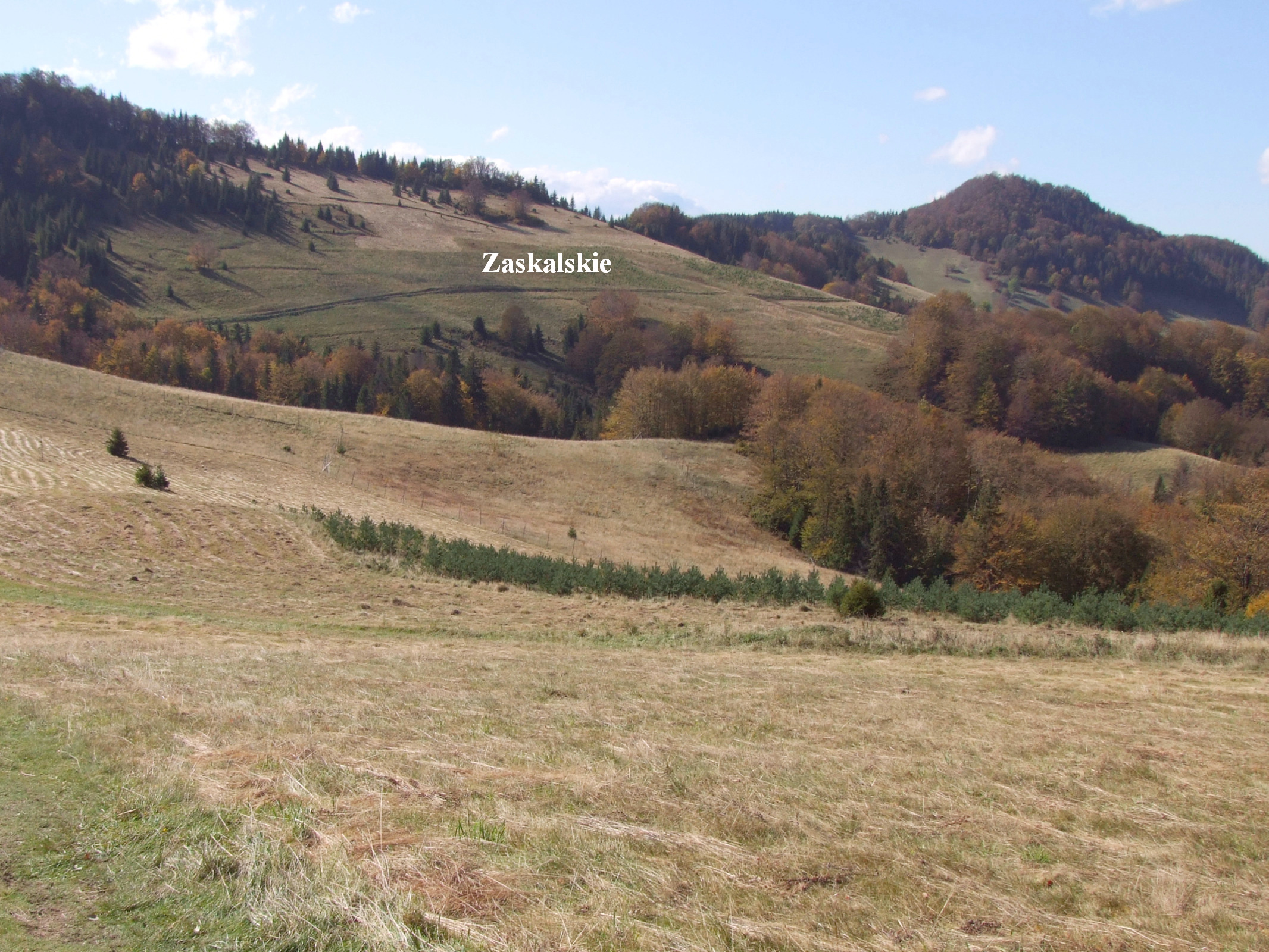 Polana Zaskalskie, Wysoka (Małe Pieniny)